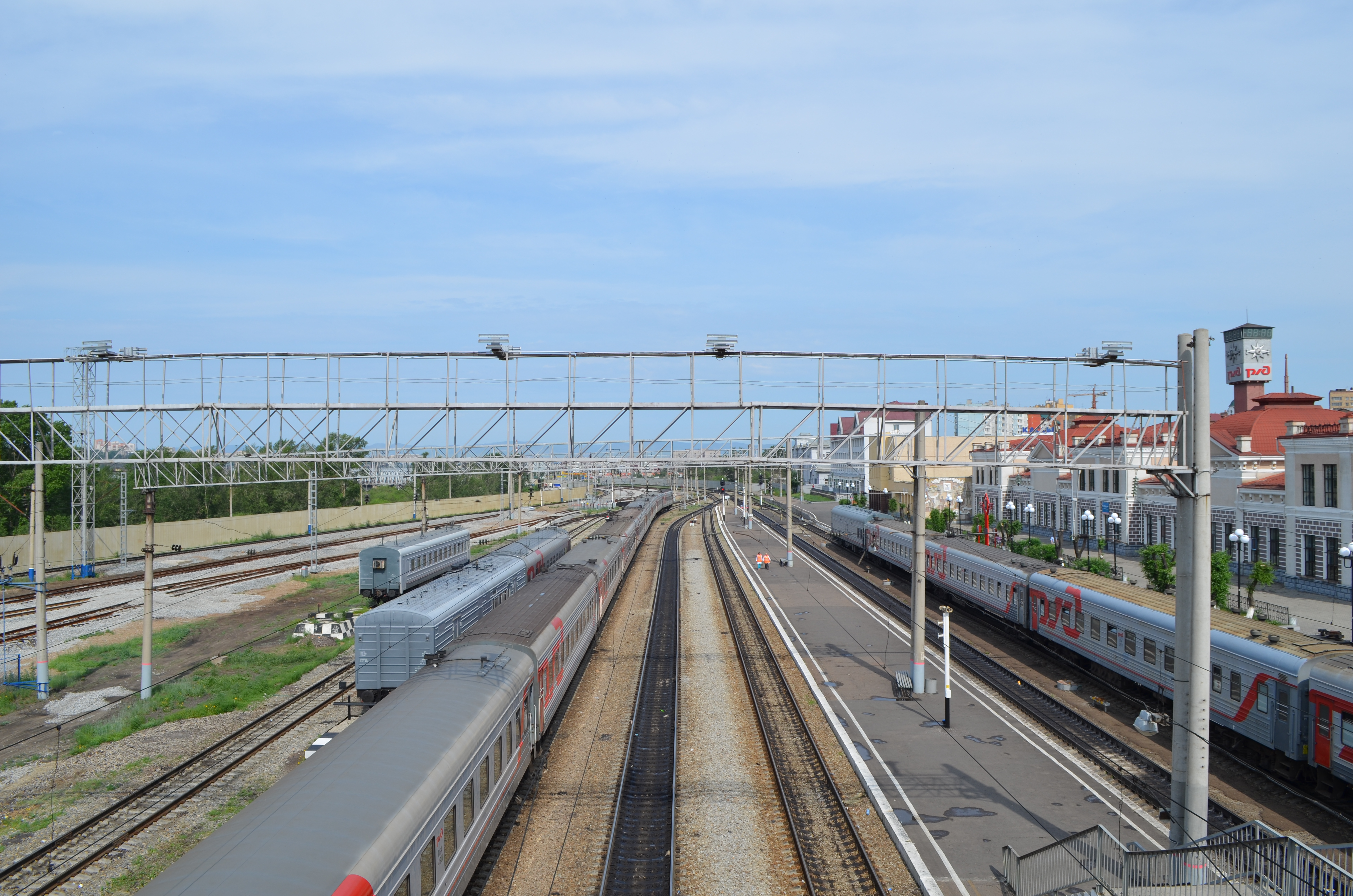 снимки конца июня - начала июля 2015 г.